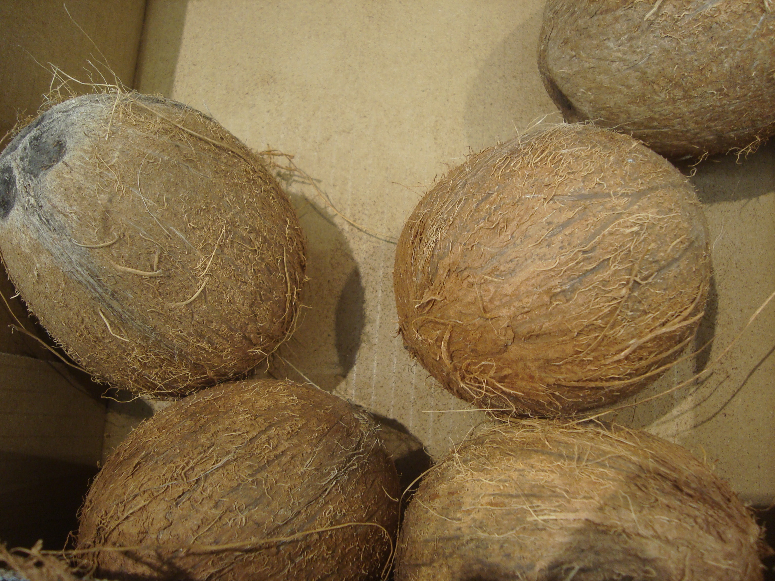 Cocos, fruta tropical.